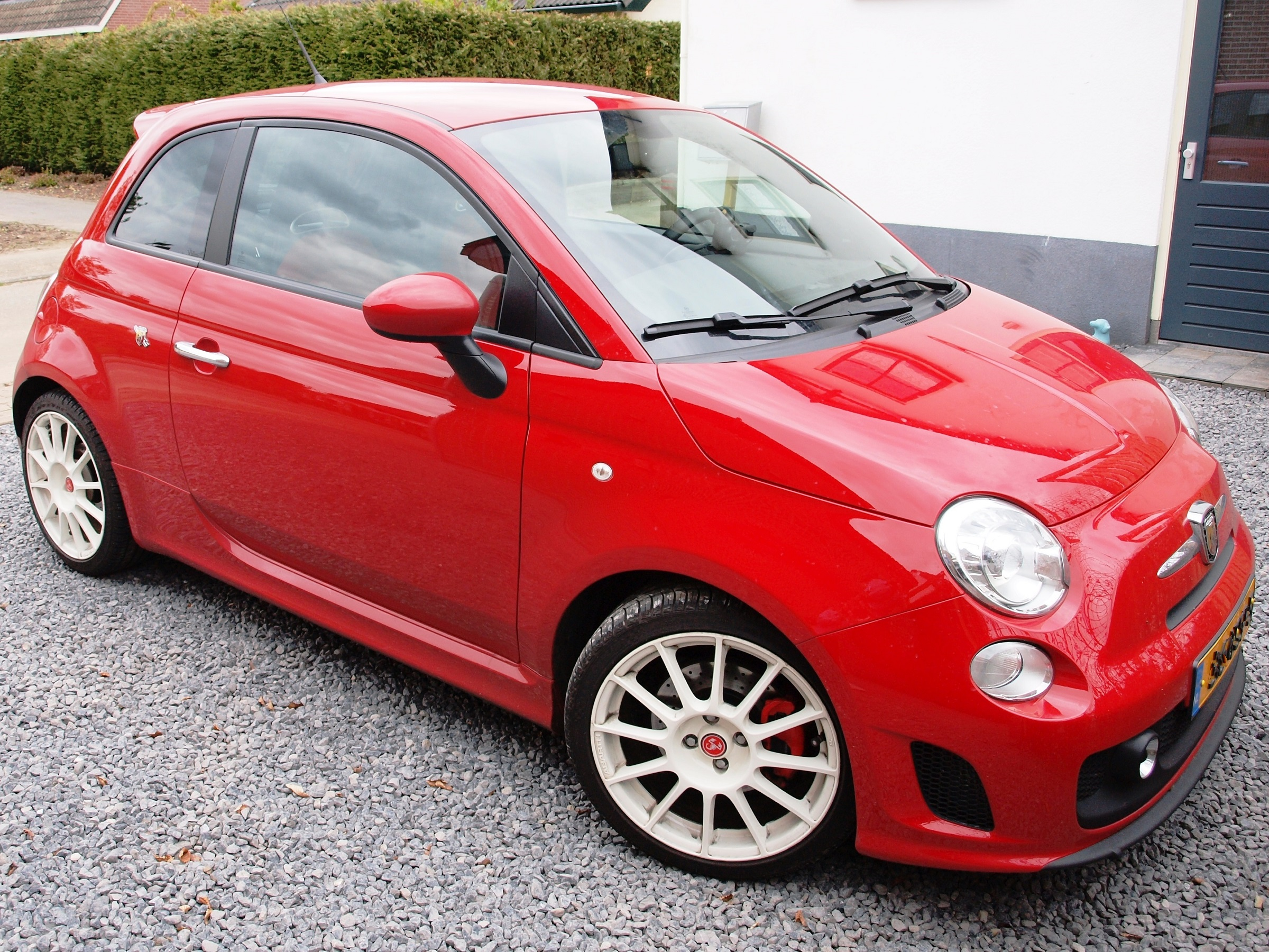 Abarth 500 Esseesse, Rood